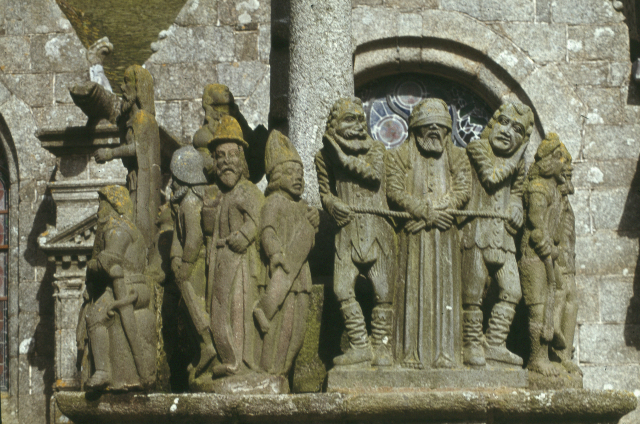 Saint-Thégonnec